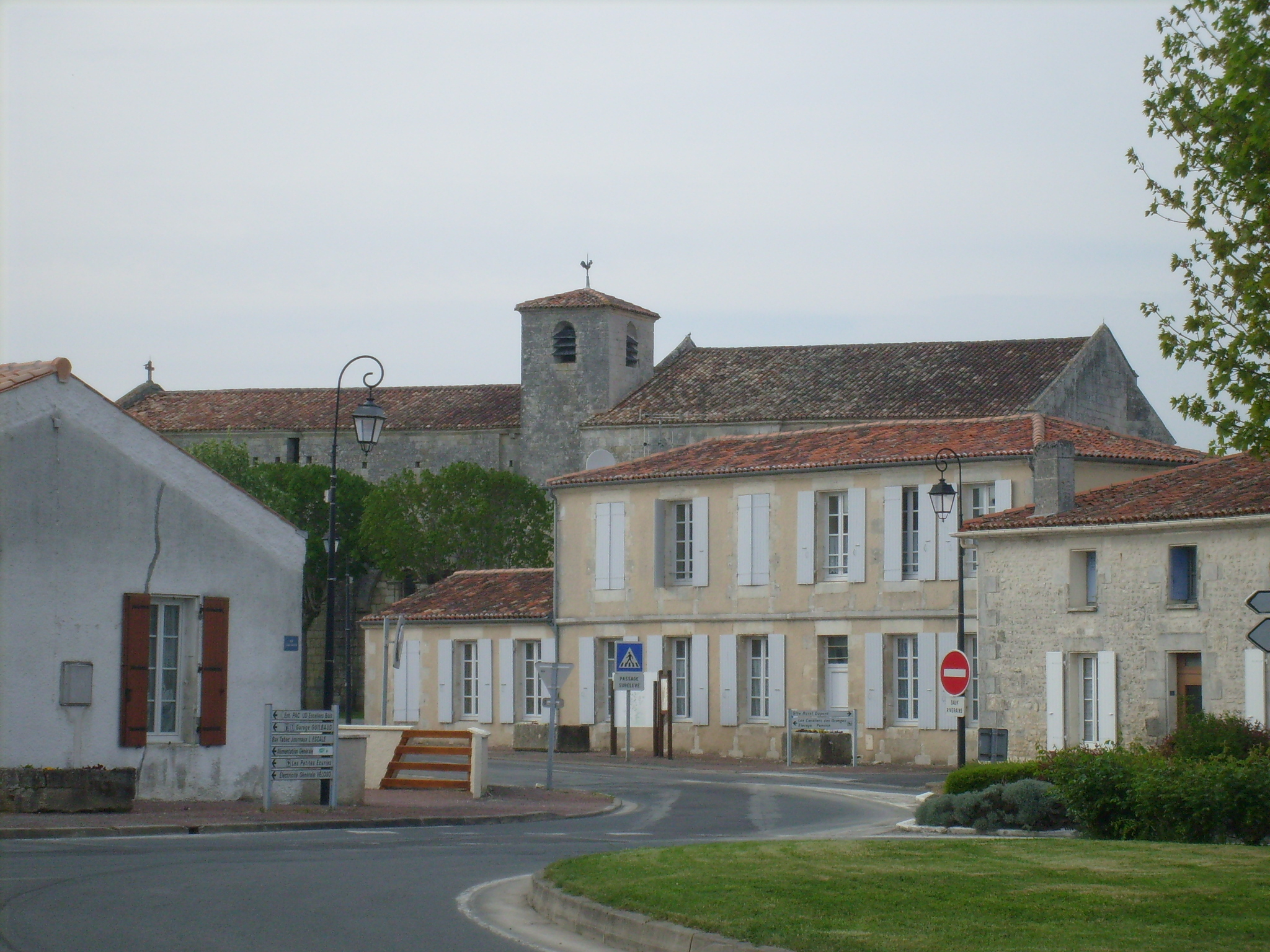 Le village de Saint-Hippolyte (Charente-Maritime)